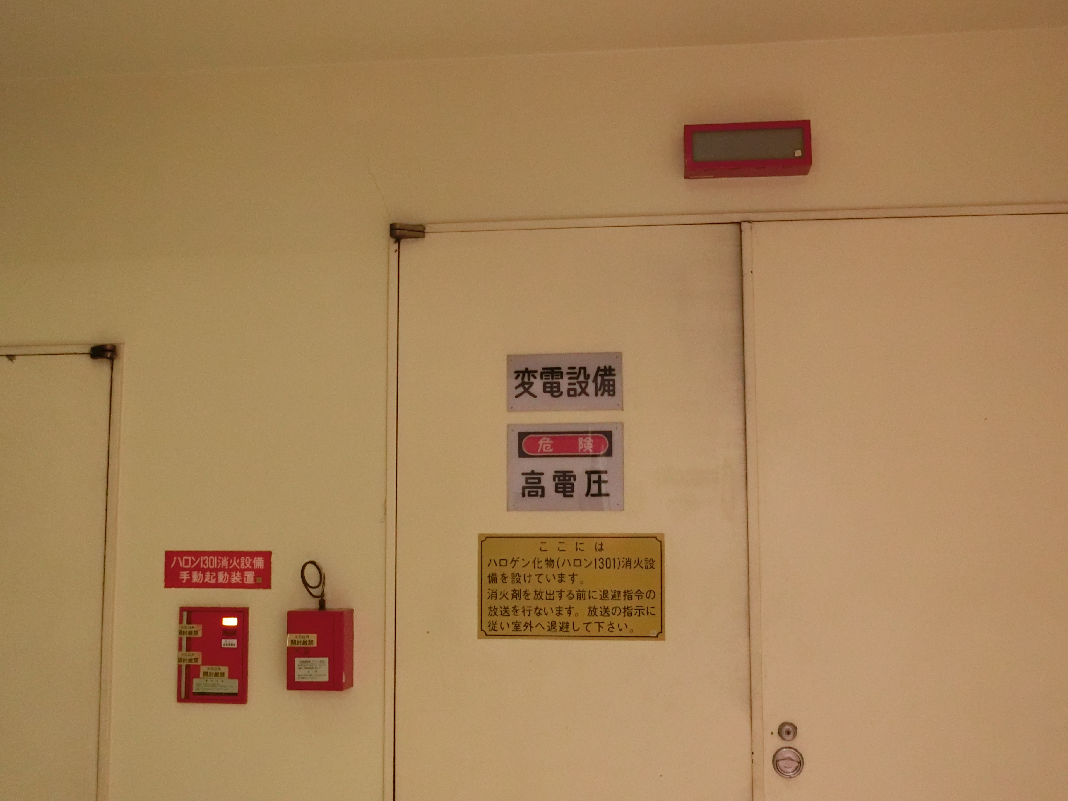 吉祥寺パルコB2階の特高受電室にあるハロゲン化物（ハロン1301）消火設備です。